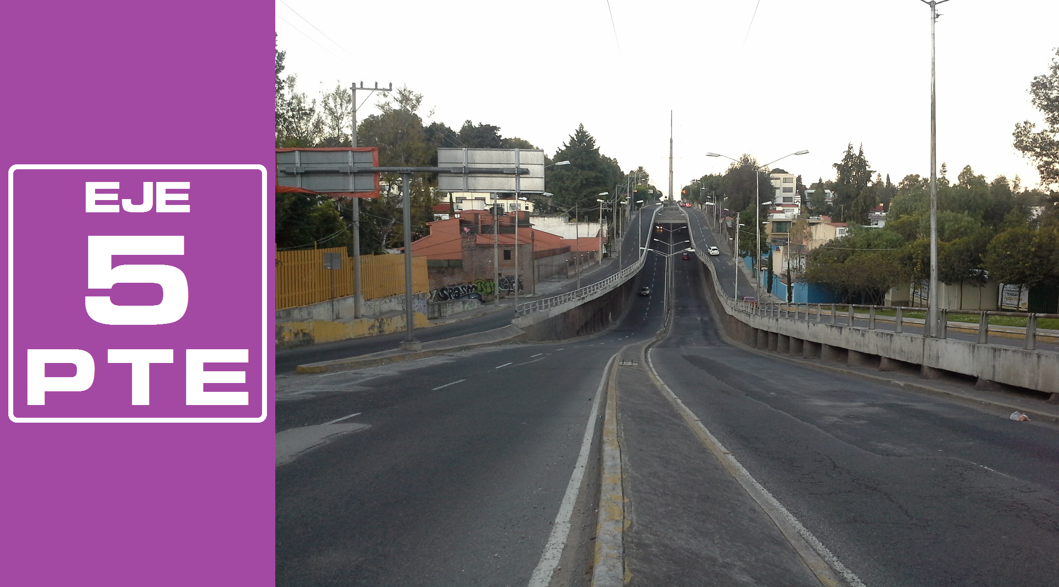 Rediseñado original de la señalética de los Ejes viales de la Ciudad de México por José García (Wiki ID: narumiyama)